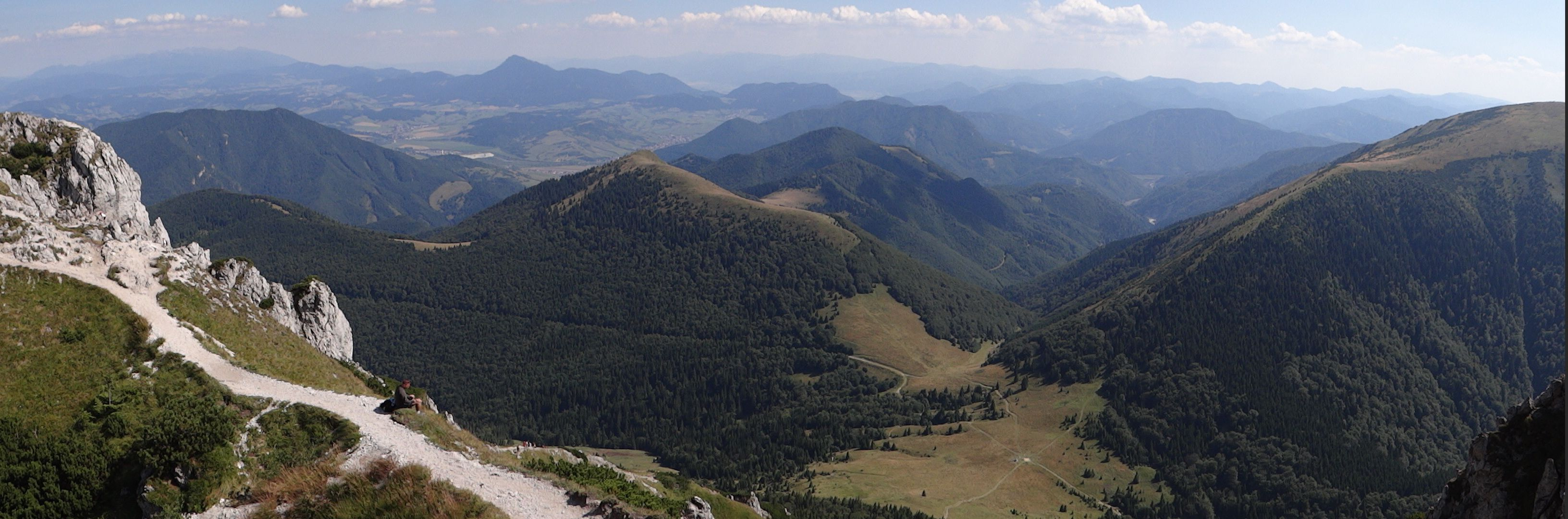 View from Veľký Rozsutec